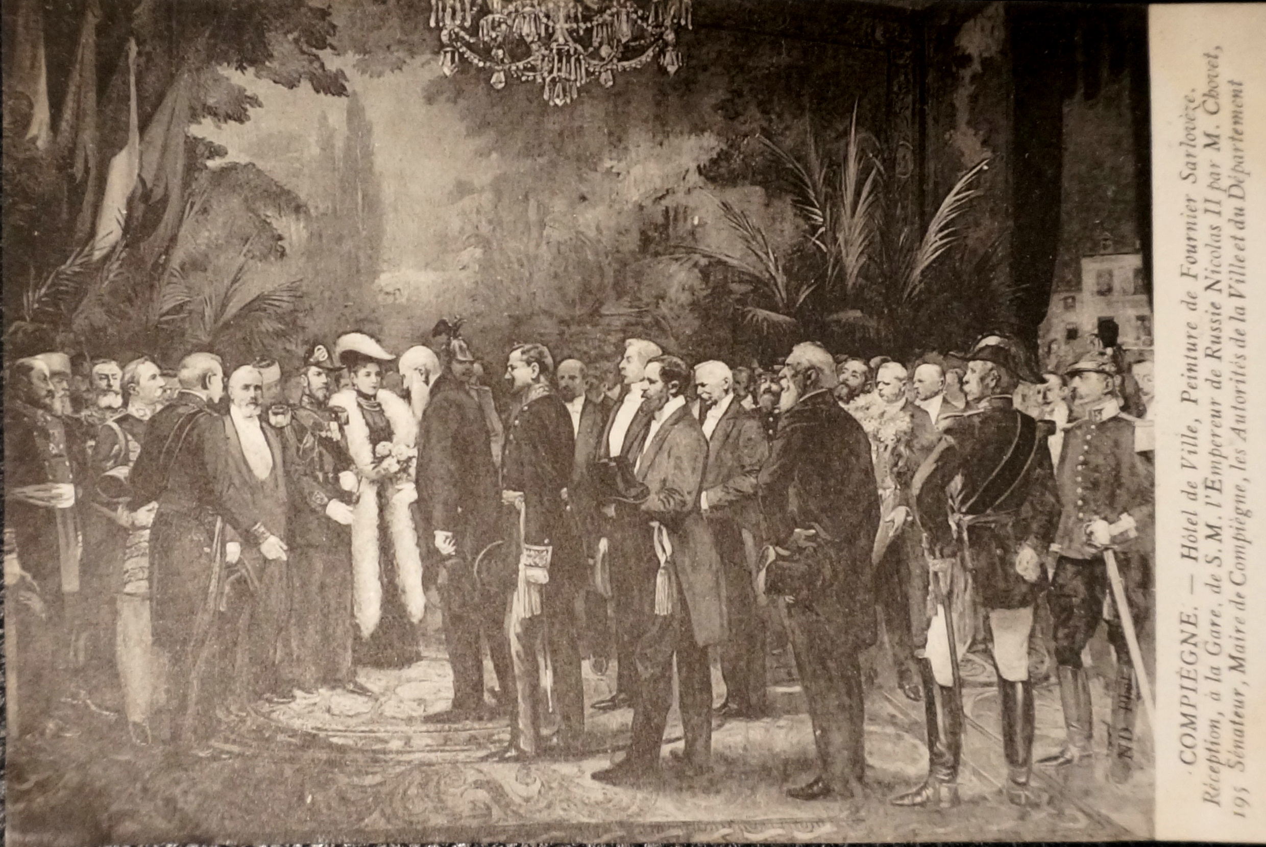 Lors des Grandes manoeuvrves de l'est de 1901, cartes posatles de 1901 de la BM de Reims sous la cote CPA t4.